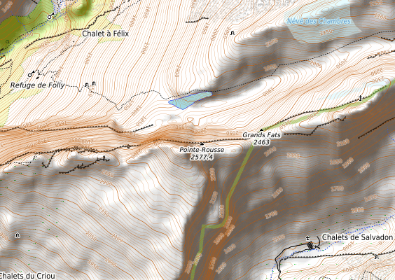 carte réalisée sur umap This map may be incomplete, and may contain errors. Don't rely solely on it for navigation.